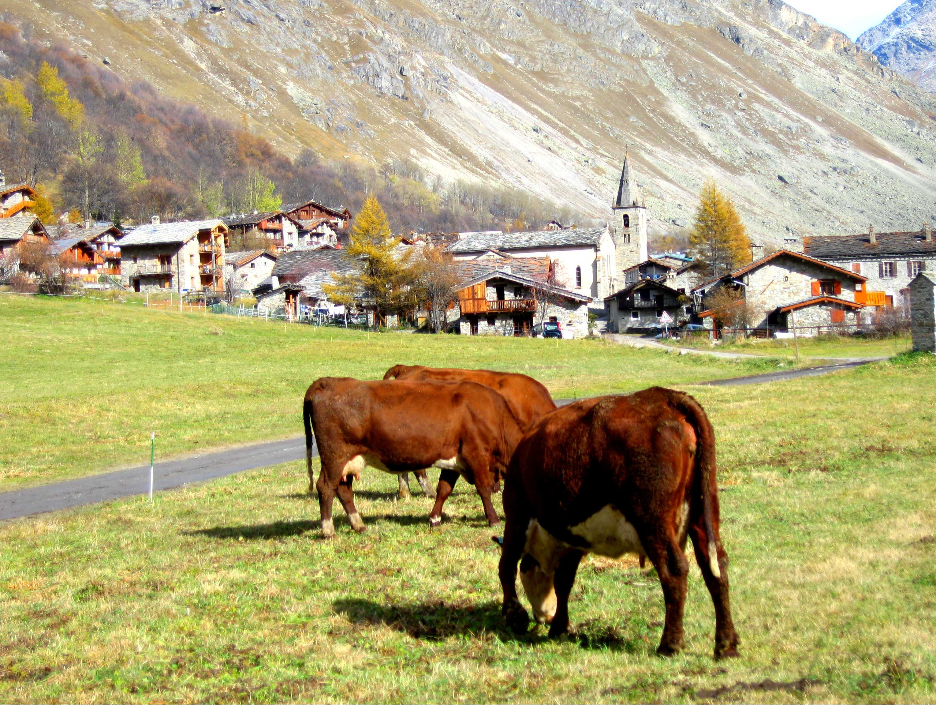 Pueblito de montaña en los alpes franceses.